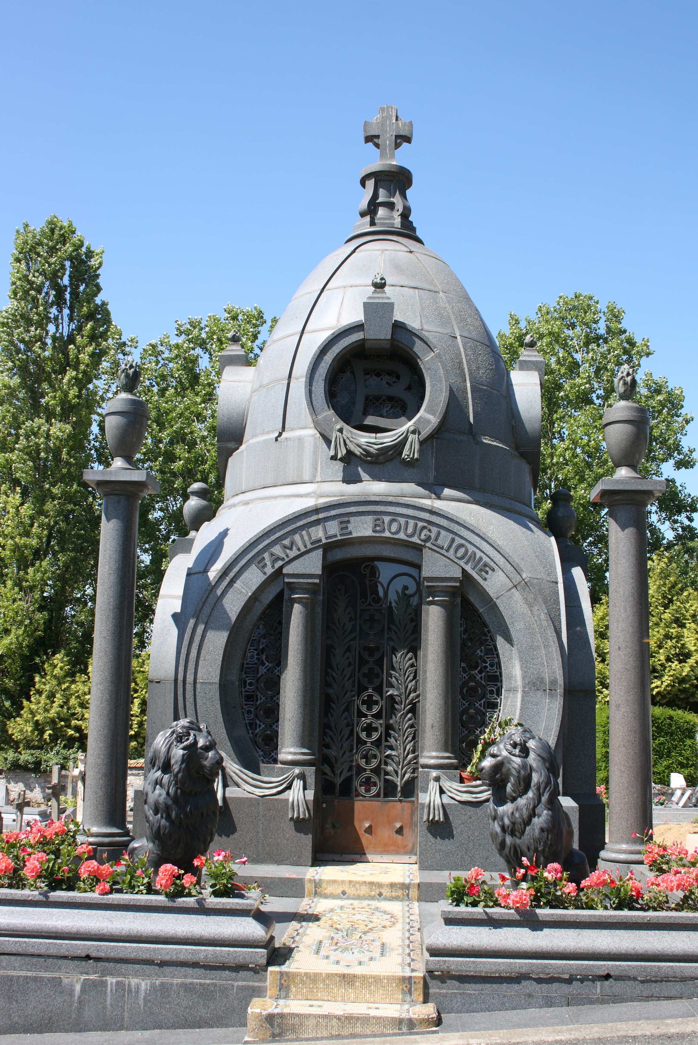 Friedhof in Lizy-sur-Ourcq, Grabkapelle der Zirkusfamilie Bouglione